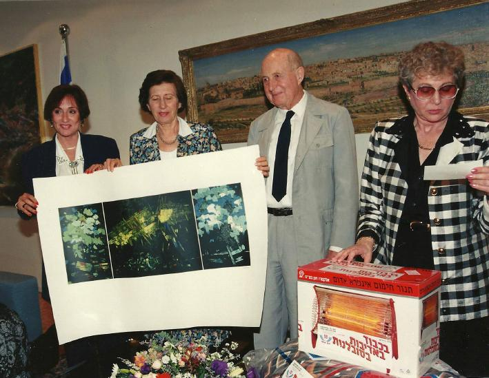 במסגרת התוכנית "מכירה פומבית" ברדיו ולקראת תחילת מבצע חורף חם לקשישים על ידי עמותת "עם יפה עם אחד" התאספו כל הפעילות של העמותה בבית הנשיא he:עזר ויצמן ורעייתו ראומה שנתנה חסותה למבצע.בתמונה מופיעים (מימין לשמאל): יו"ר העמותה נעמי שדמי, he:נשיא בית המשפט העליון בדימוס he:משה לנדוי, אשת נשיא המדינה he:ראומה ויצמן ומפיקת התוכנית ברדיו he:רחל הרמתי, ובידם he:הדפס של he:מרדכי ארדון, שנתרם למכירה הפומבית.